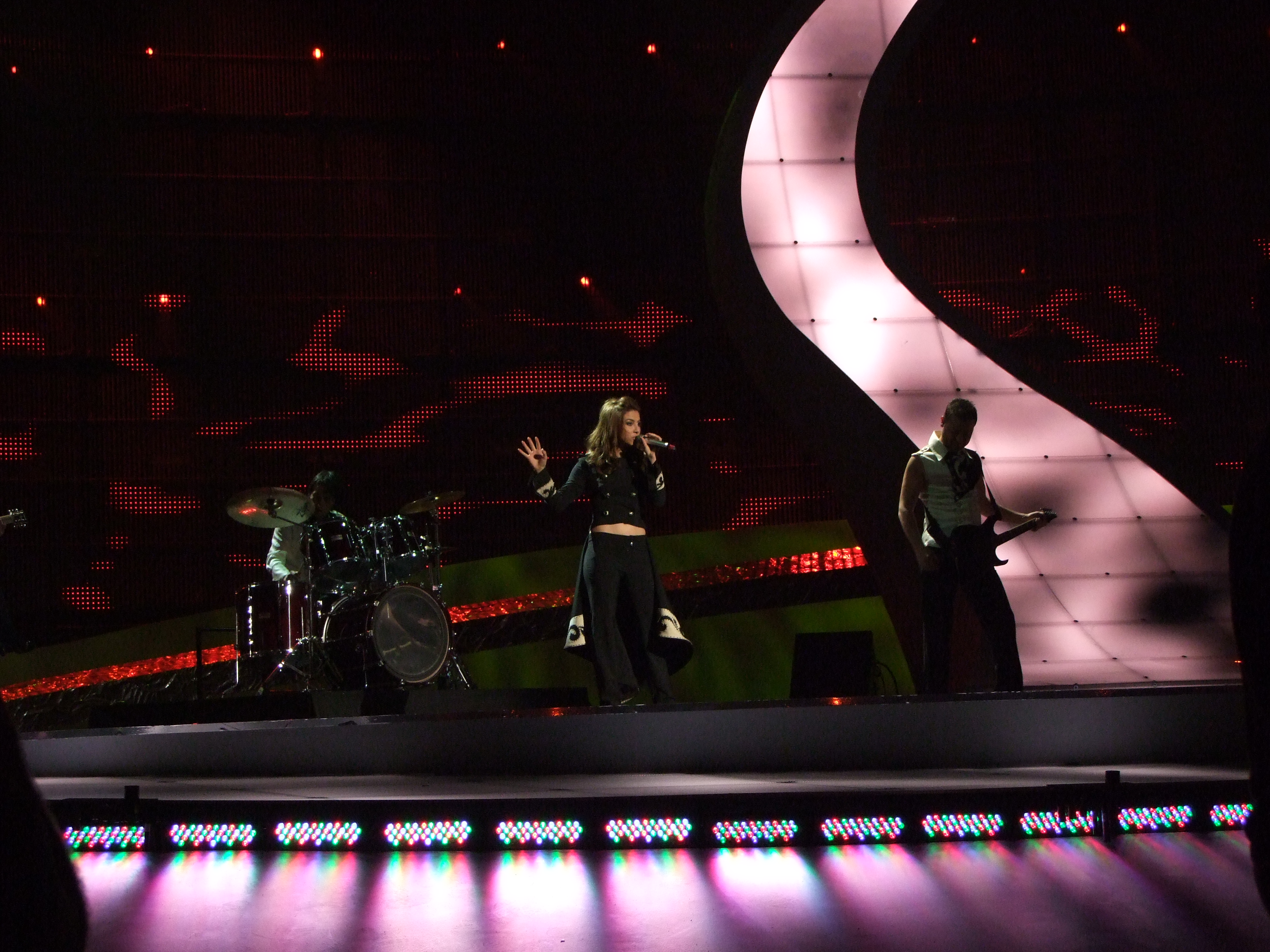 Semifinal 2 Eurovision 2008